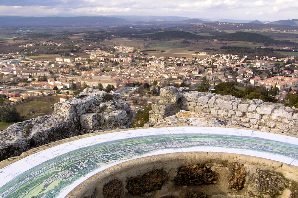 Une vue générale de la commune de Saint-Paul-Trois-Chateaux dans la Drôme prise depuis la colline de la Sainte-Juste qui surplombe la ville, à l'hiver 2006.